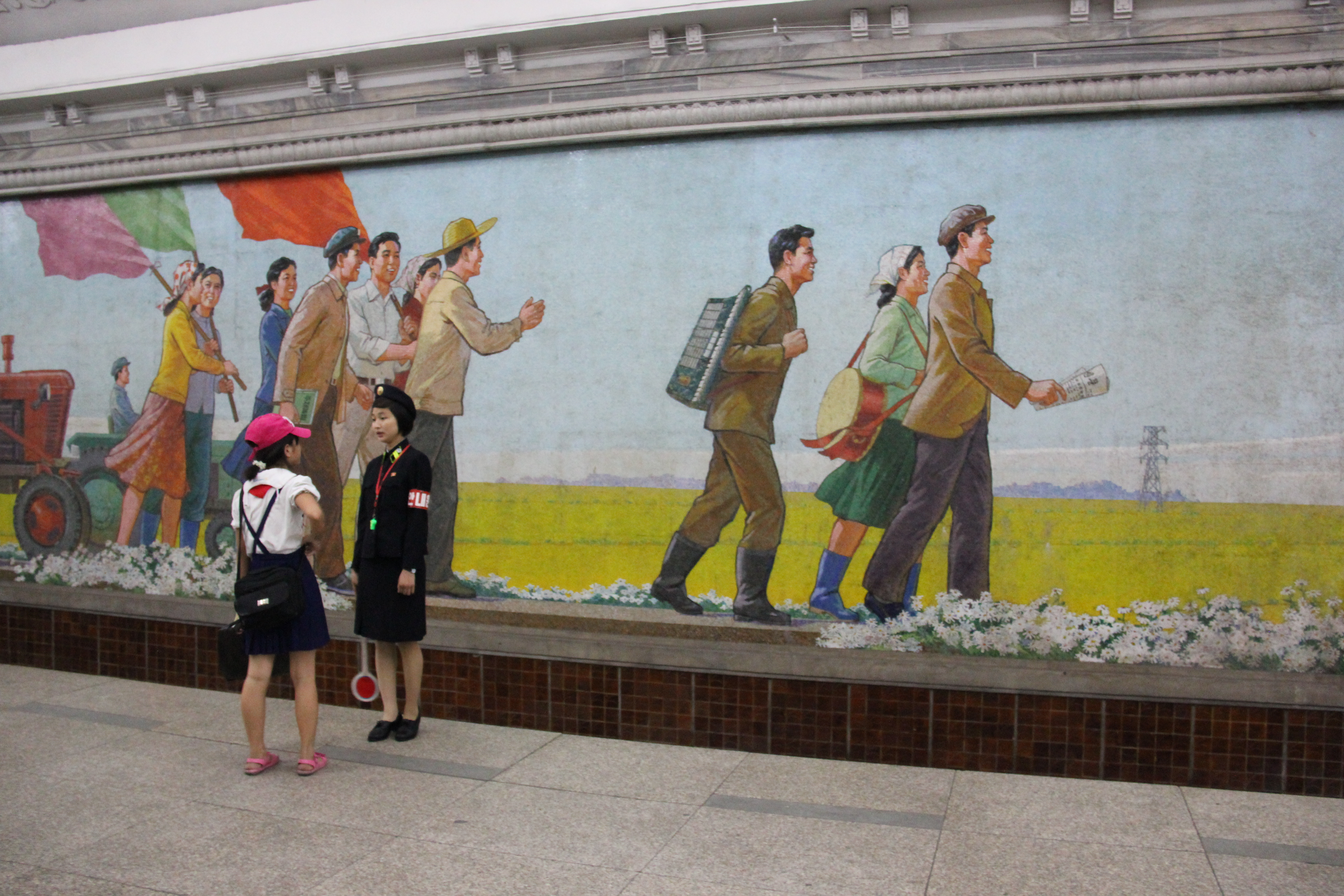 Pyongyang Metro